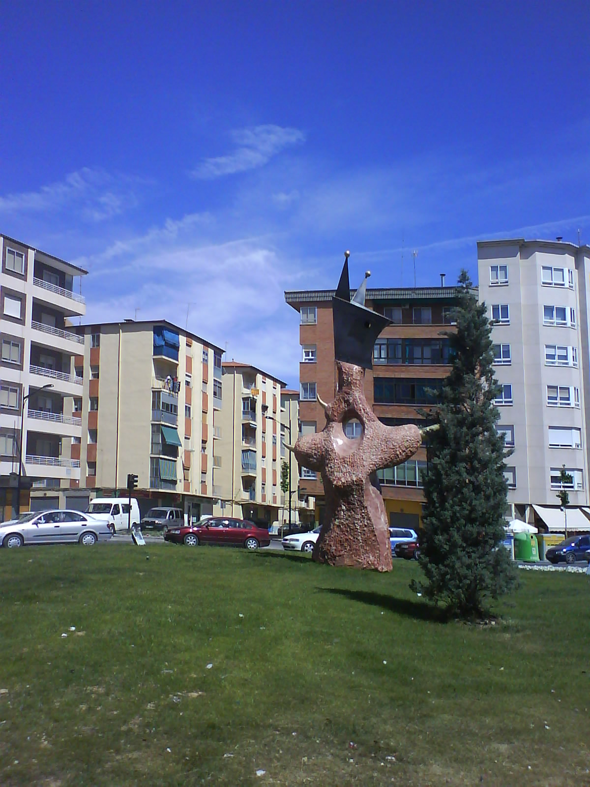 Escultura abstracta en una de las rotondas de la ciudad de Albacete